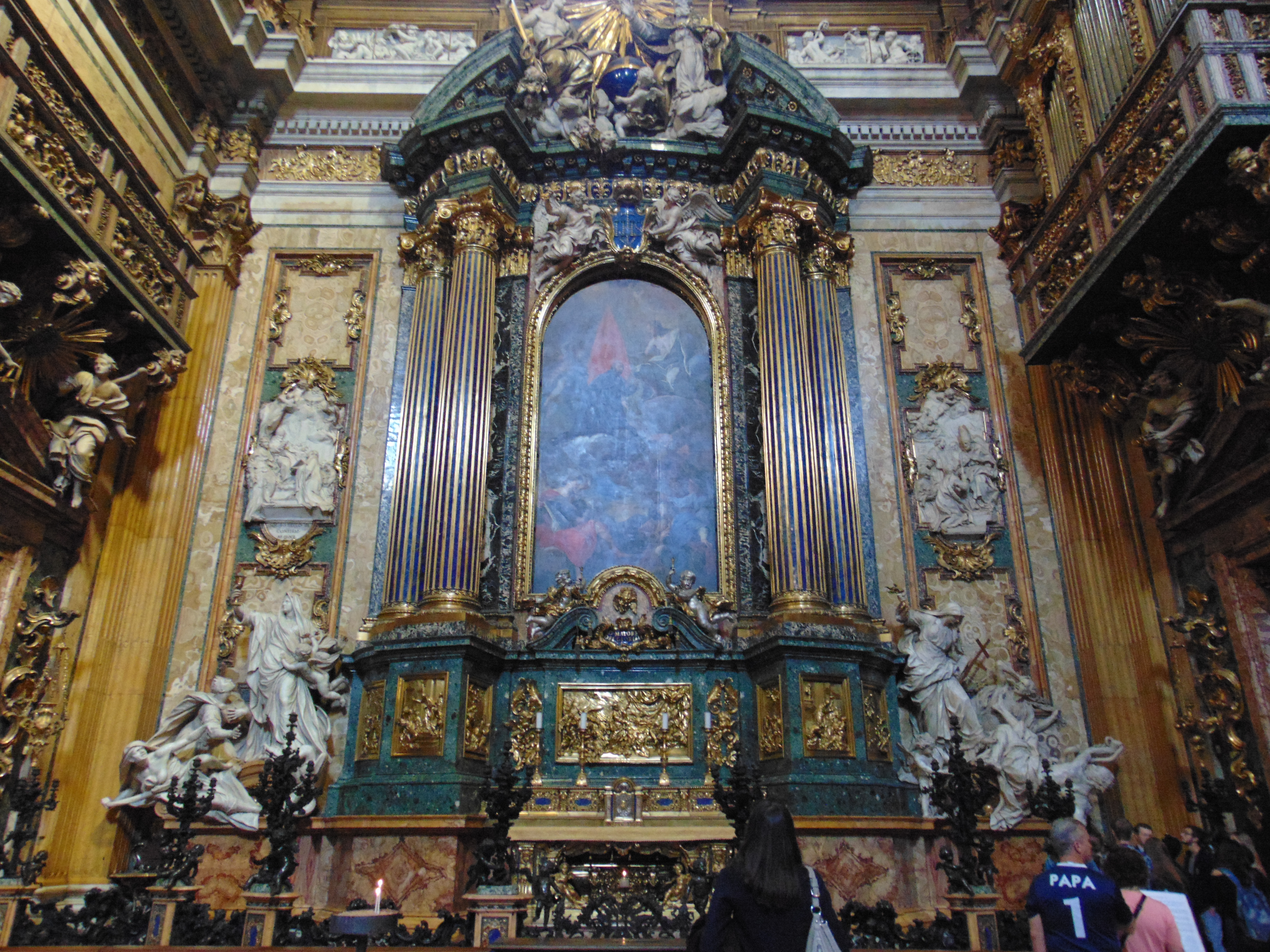 Chiesa del Gesù